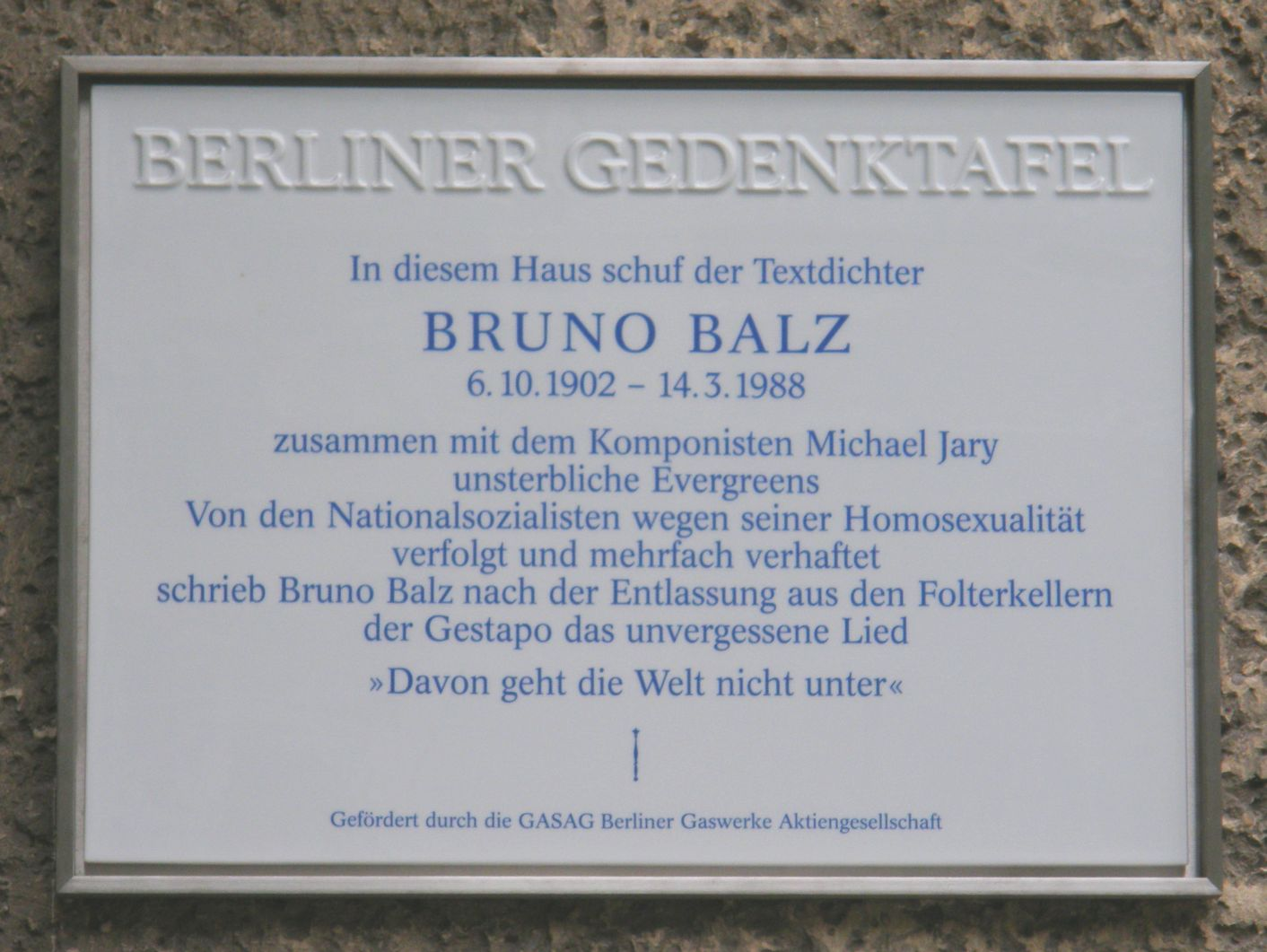 Berliner Gedenktafel für Bruno Balz. Fasanenstraße 60, Berlin-Wilmersdorf. Enthüllt am 21. Mai 2008.